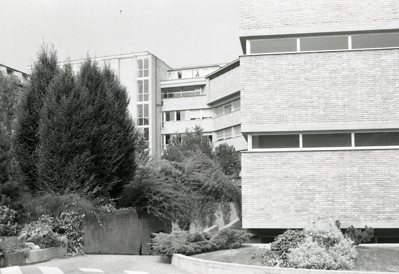 Bologna. Ospedale Sant'Orsola. cliniche universitarie: esterni. Servizio fotografico : Bologna, 1974 / Paolo Monti. - Strisce: 6, Fotogrammi complessivi: 35 : Negativo b/n, gelatina bromuro d'argento/ pellicola ; 35 mm. - ((Sul portanegativi: N[I]K[MA]T FP4. - Occasione: Pubblicazione. - Fonte: Agenda di Paolo Monti: Leica 1501-3000 Controllo numerazione (1950-1978), presso Archivio Paolo Monti. - Fonte: Monografia di Università degli studi [Bologna]: Rassegna storica dell'insediamento: catalogo ragionato delle realizzazioni edilizie universitarie in rapporto all'assetto urbano, Bologna, Tip. Labati e Nanni (1974). - Fonte: Fattura di Paolo Monti: IV. Commesse/ Fattura n. 16 (1974/09/17), presso Archivio Paolo Monti